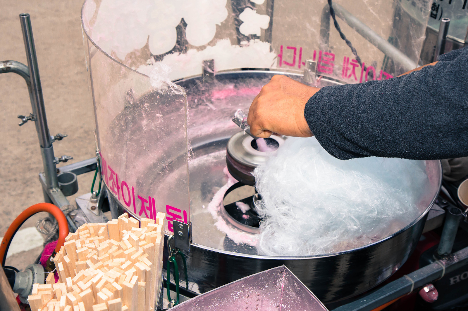 솜사탕제조법